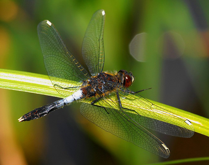 Leucorrhinia caudalis